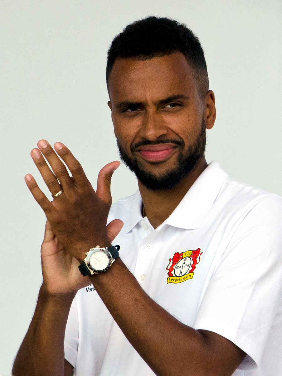 Isaac Kiese Thelin, schwedischer Fußballspieler